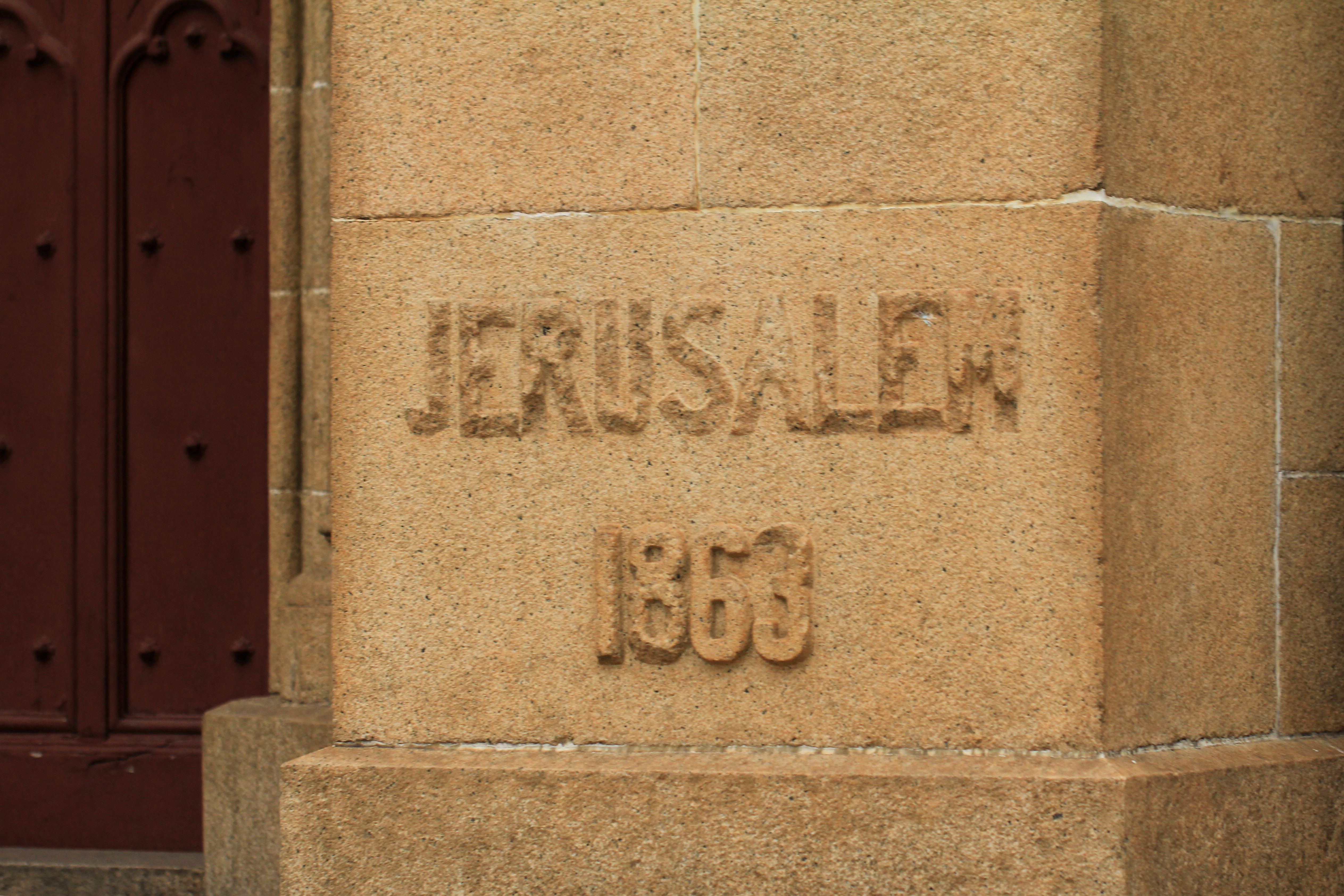 石室圣心大教堂石刻